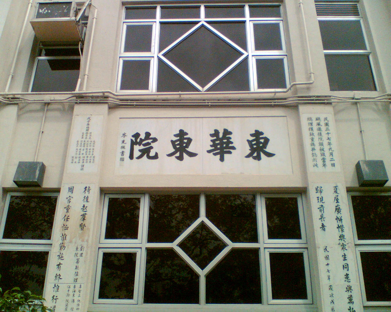 中文（香港）: 位於東院道的東華東院舊翼入口。